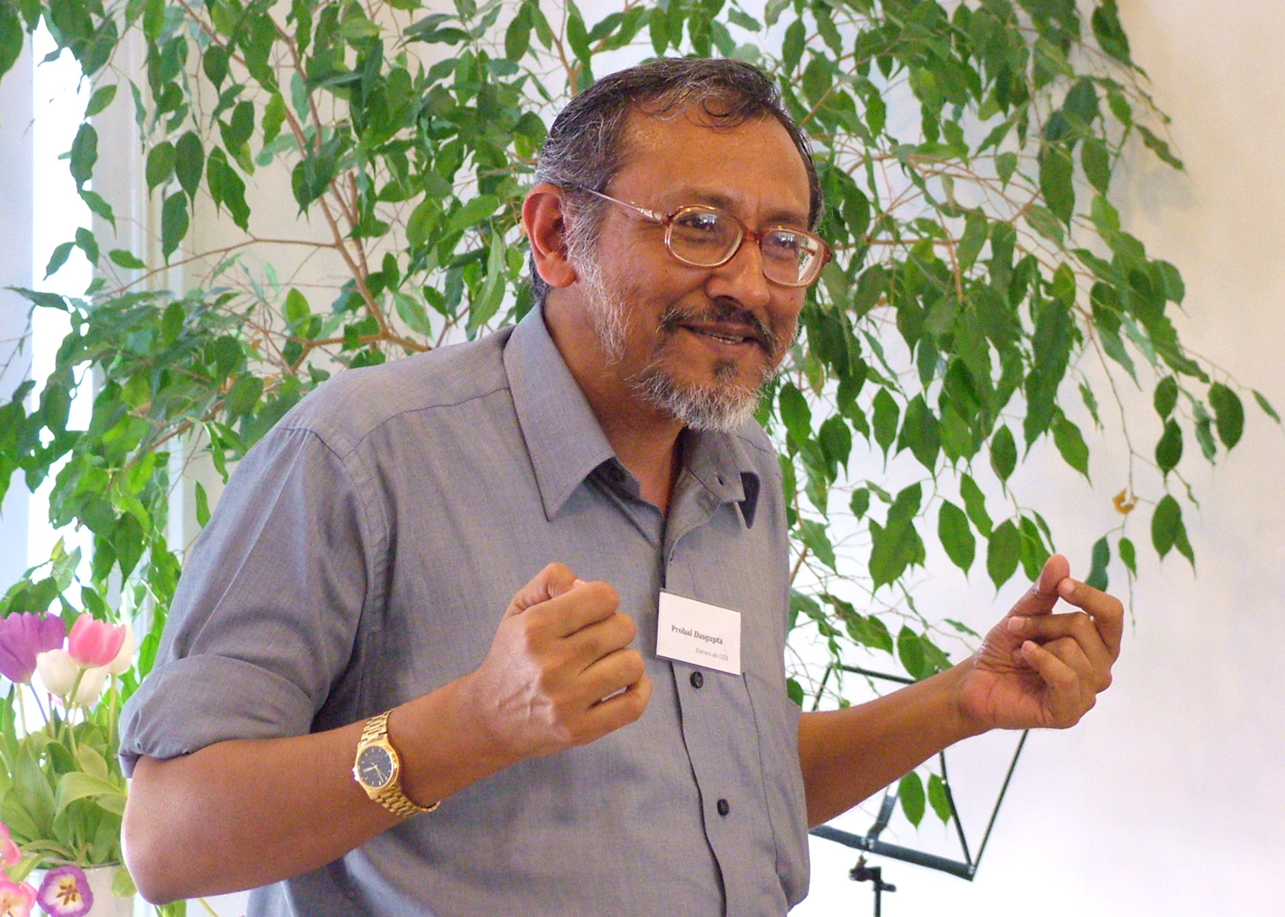 Probal Das Gupta, prelegante en Malferma Tago de UEA.